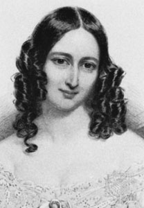 engraving of Ellen Kean (1805-1880)